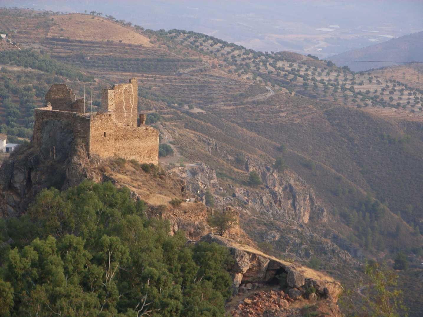 Maurisches Kastell, Lanjarón (Granada)